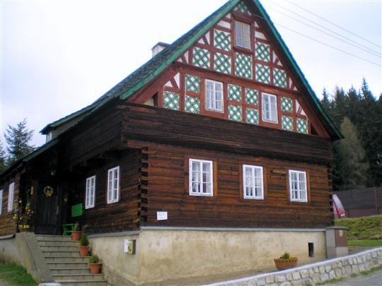 historická budova č.p. 3